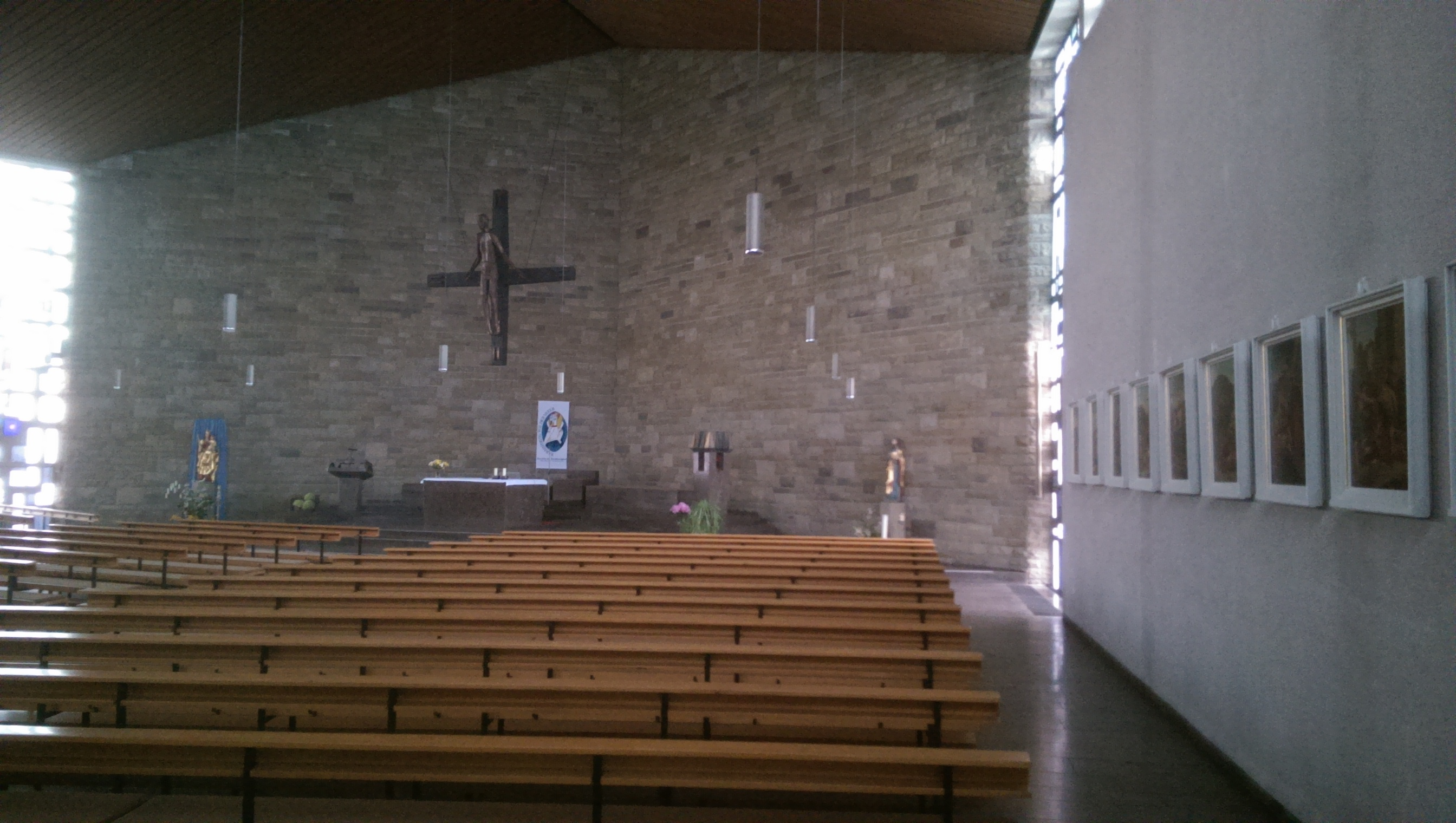 Pfarrkirche St. Bartholomäus Bergtheim; Blick vom Eingang zum Altar